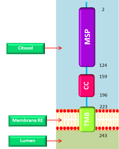 Dibuix esquemàtic dels dominis de la proteïna VAP-B